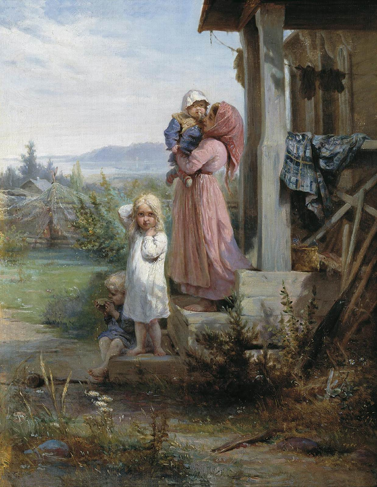 Картина «Утро в деревне» (холст, масло), находится в Нижнетагильском художественном музее изобразительных искусств.